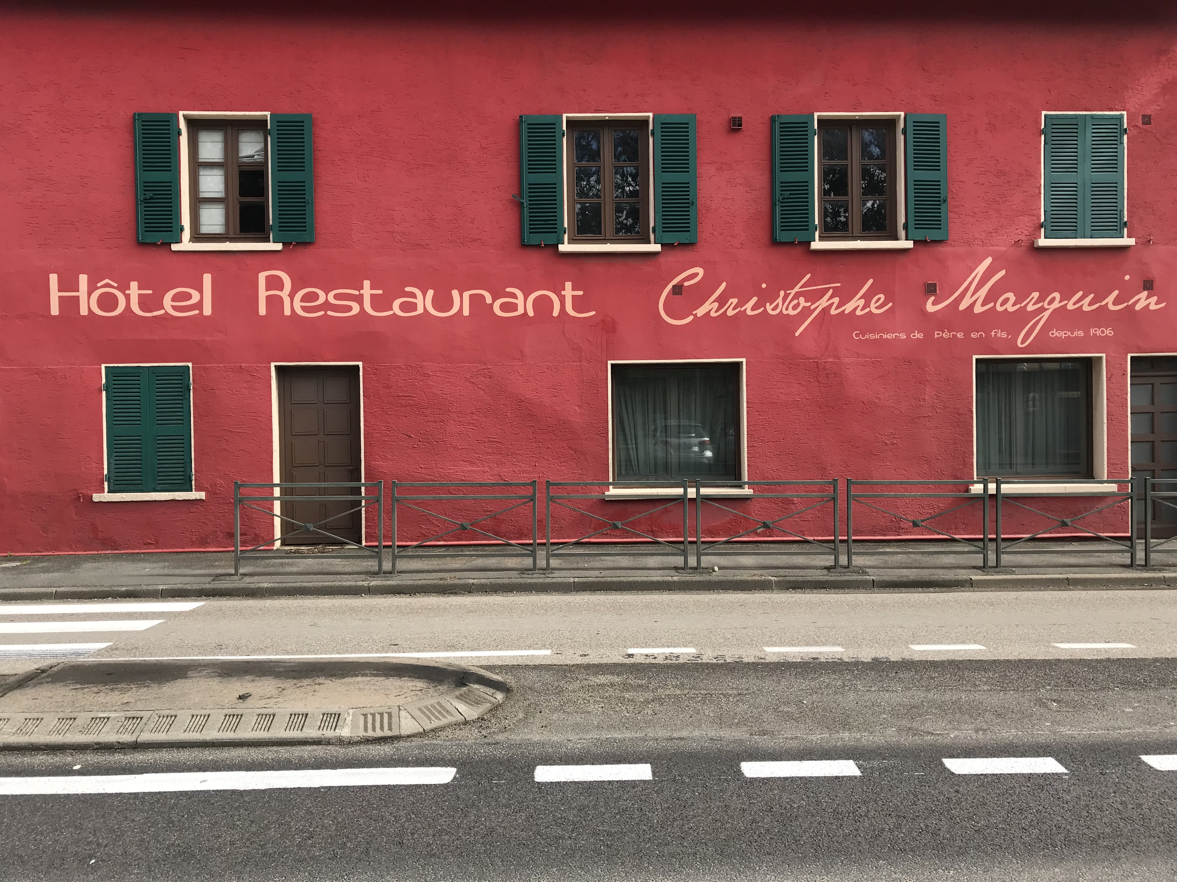 Restaurant Marguin aux Échets, fermé en 2017.